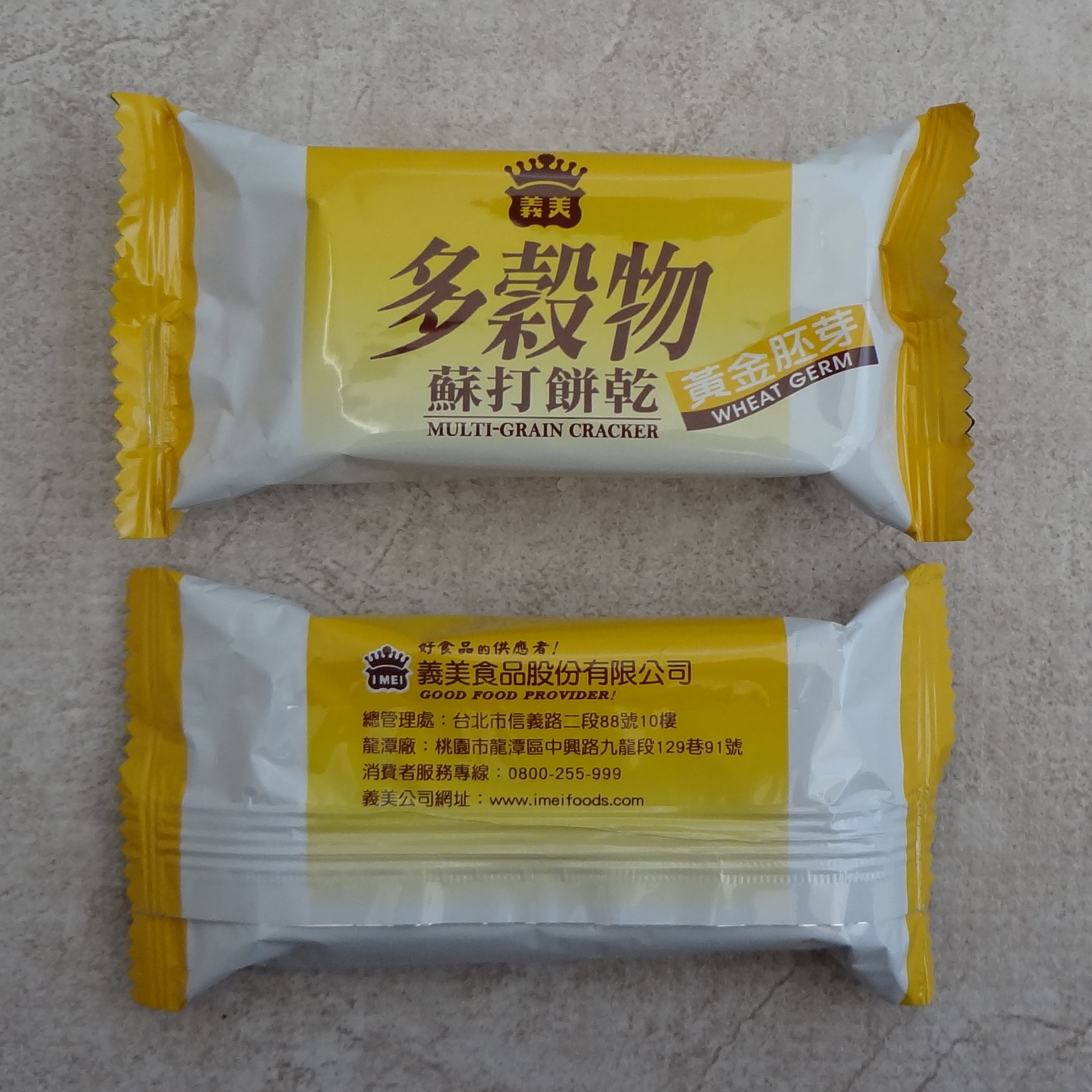 中文（台灣）: 義美多穀物蘇打餅乾2小包裝。